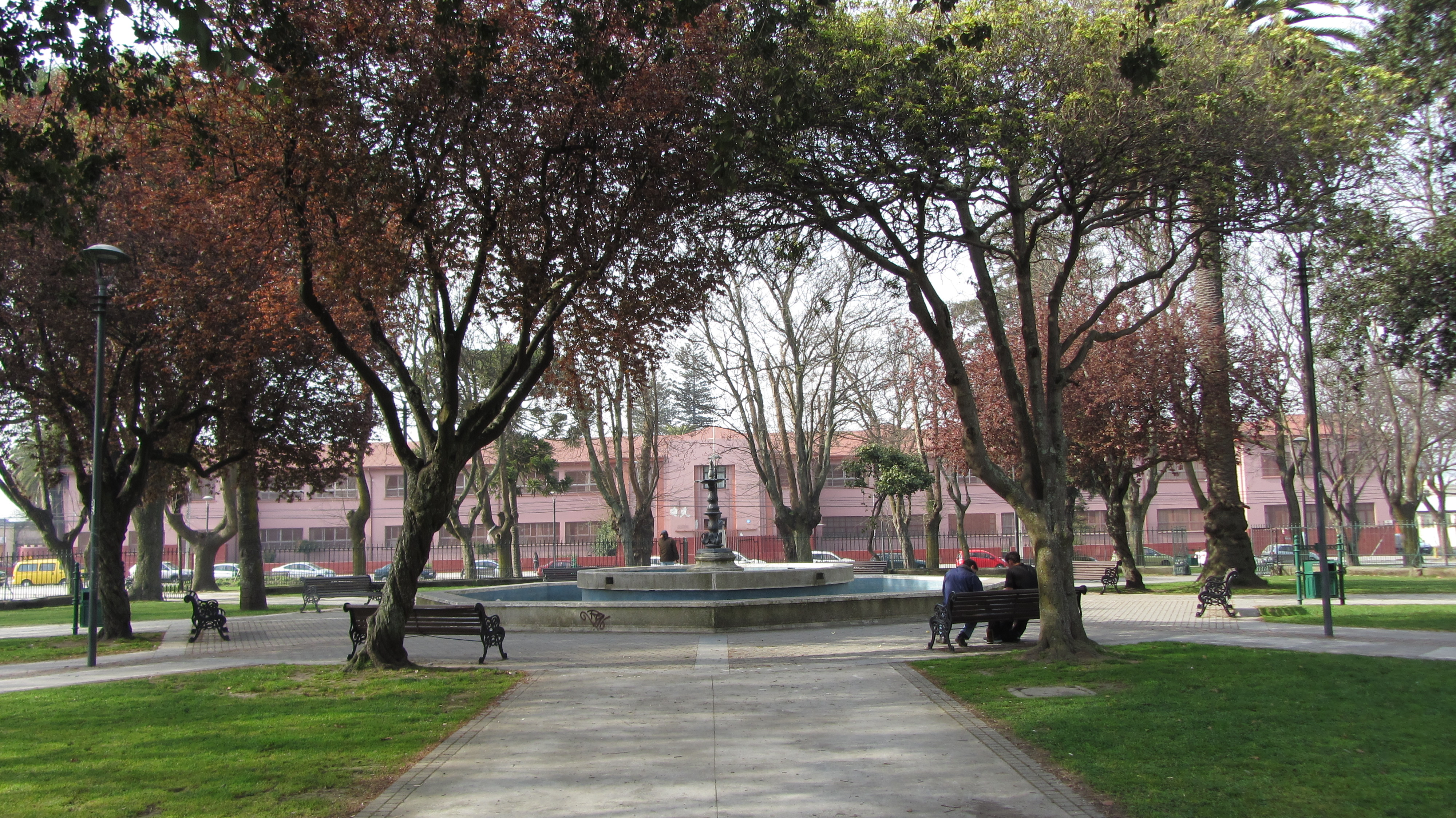 Plaza Cruz con pileta y colegio de niñas María Inmaculada Concepción, Chile Septiembre de 2012